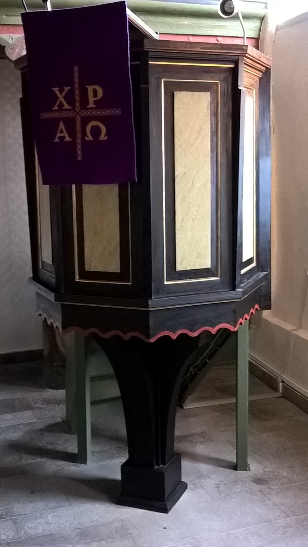 Evangelische Kirche Königsberg, Gemeinde Biebertal, Hessen, Deutschland